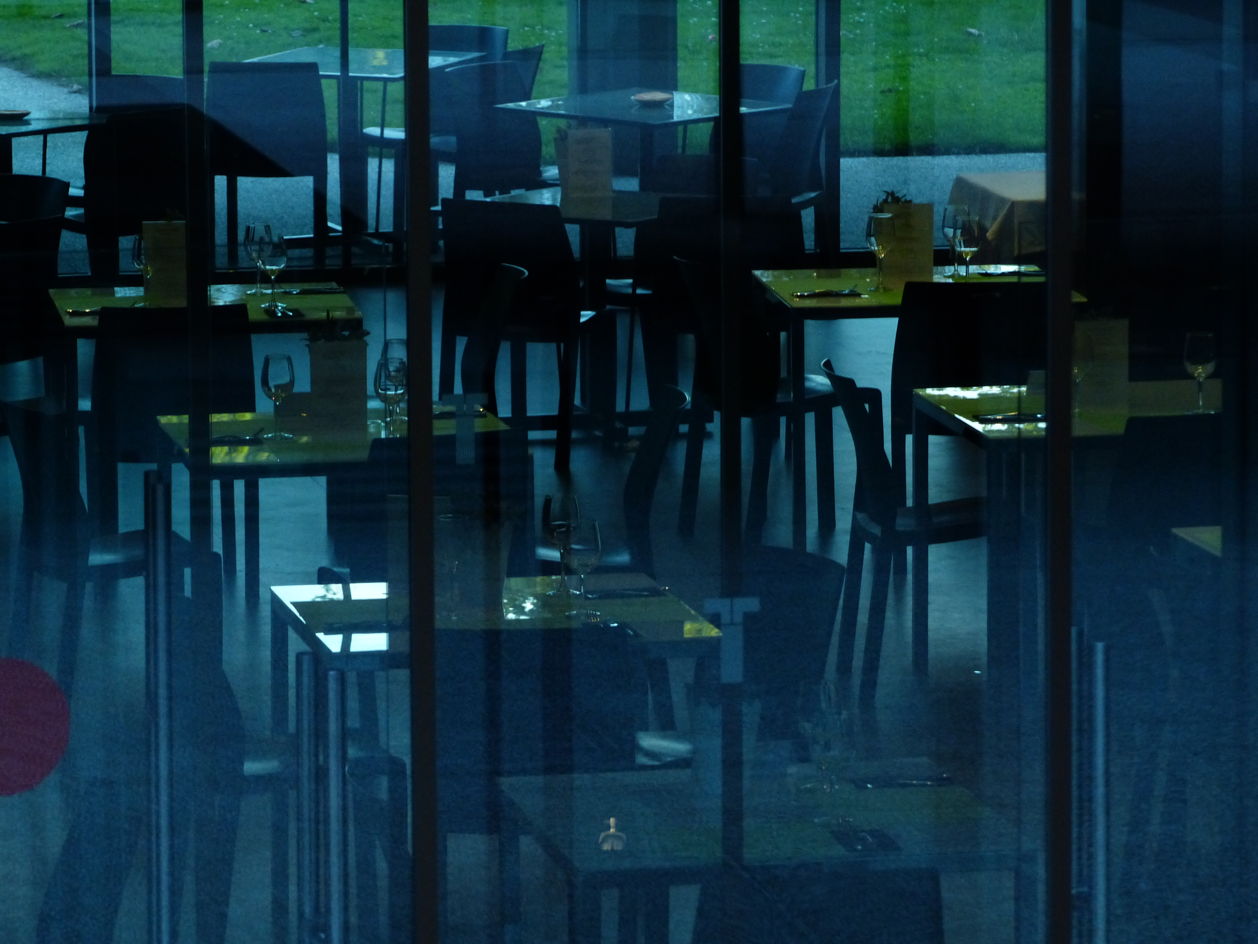 Museo del Traje, comedor restaurante.